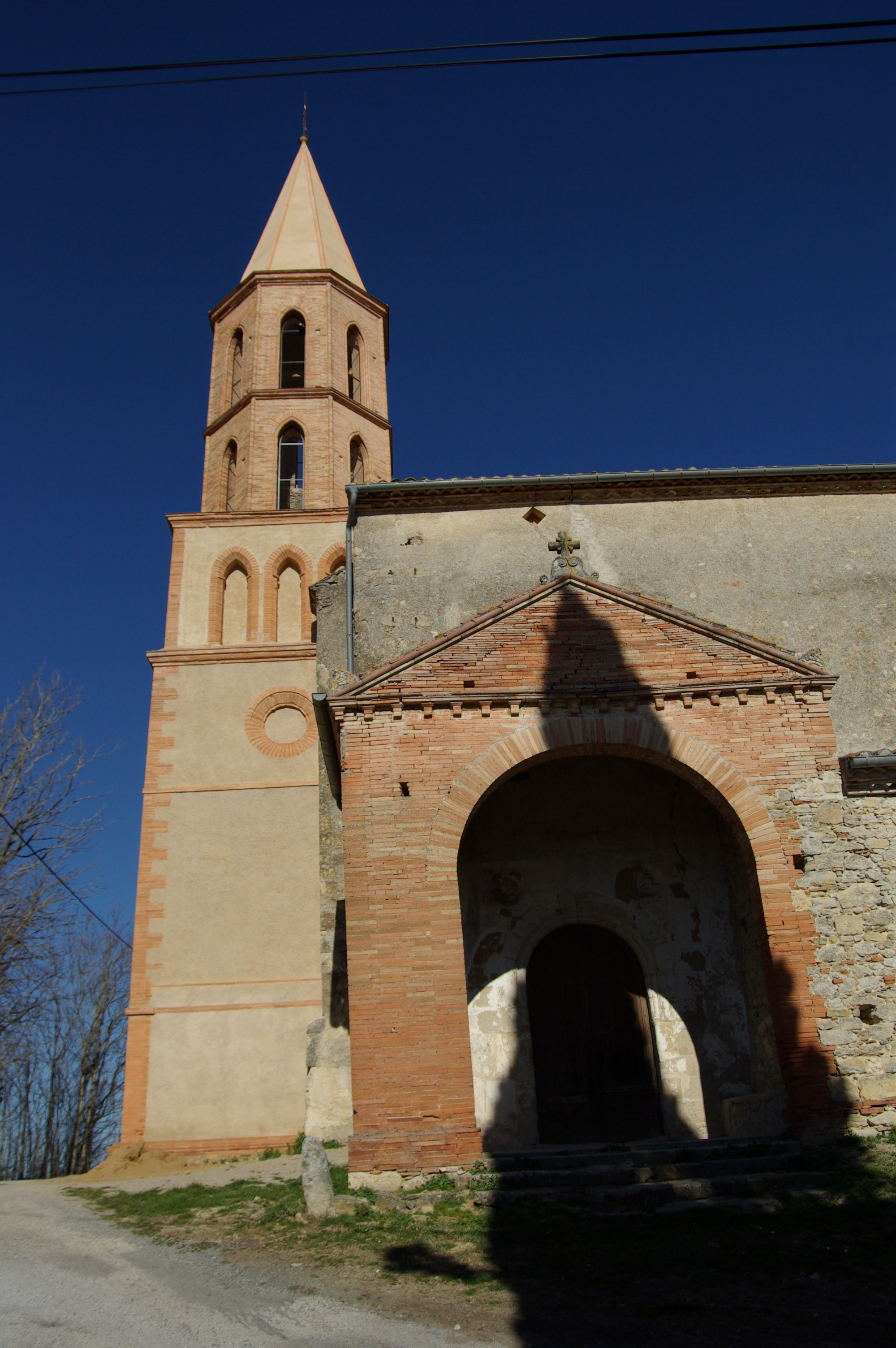 France, Tarn (81), Montgey, église de Montgey